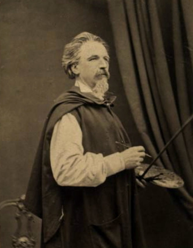 Lev Lagorio